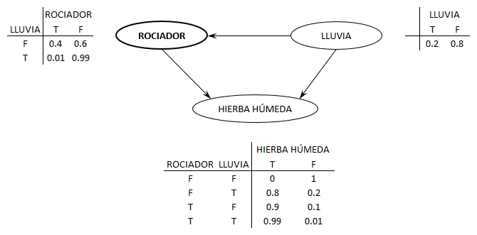 Representación de una red Bayesiana simple con sus respectivas funciones de probabilidad conjunta.